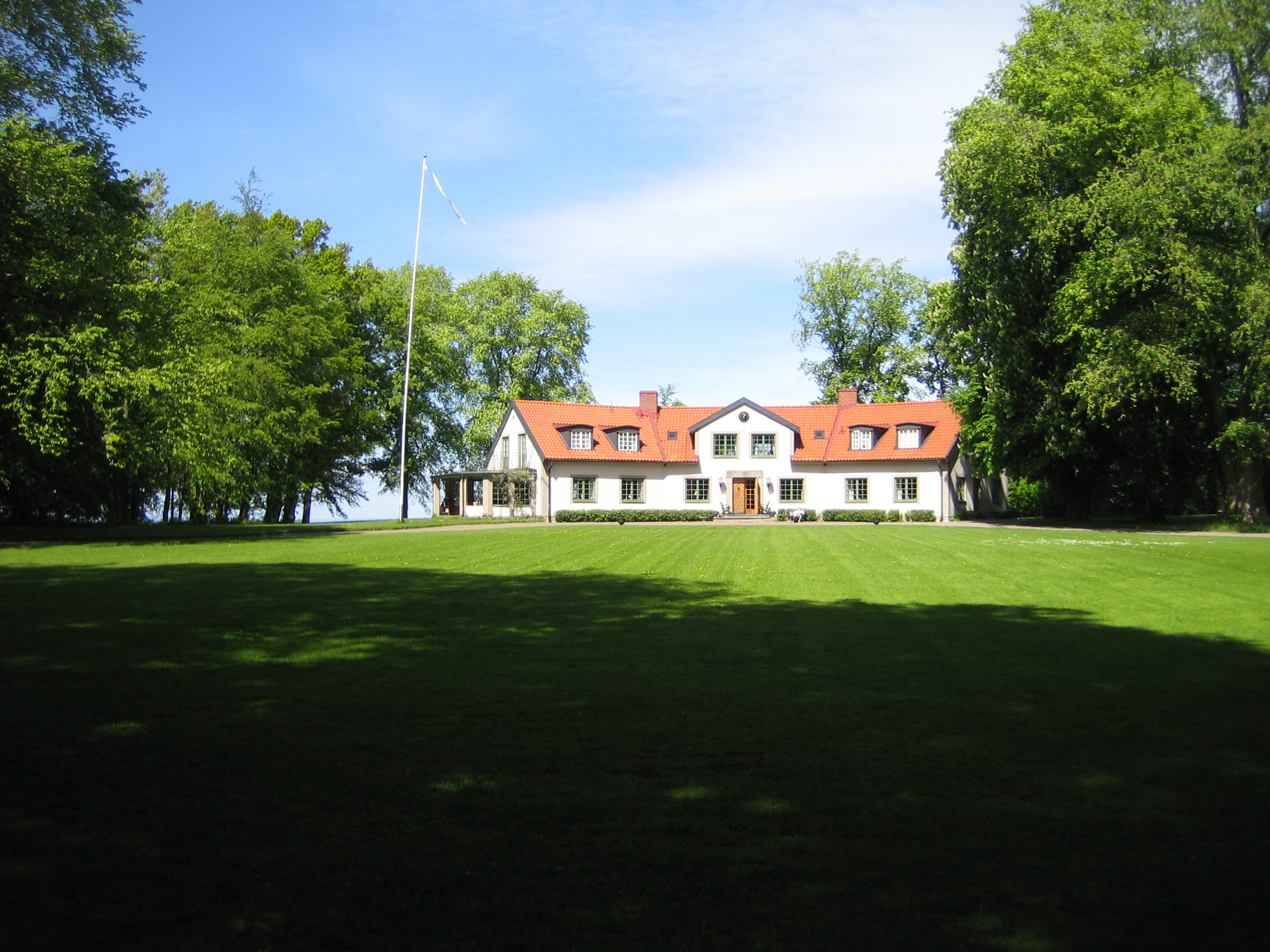 Klosterstad, Vadstena, Sweden